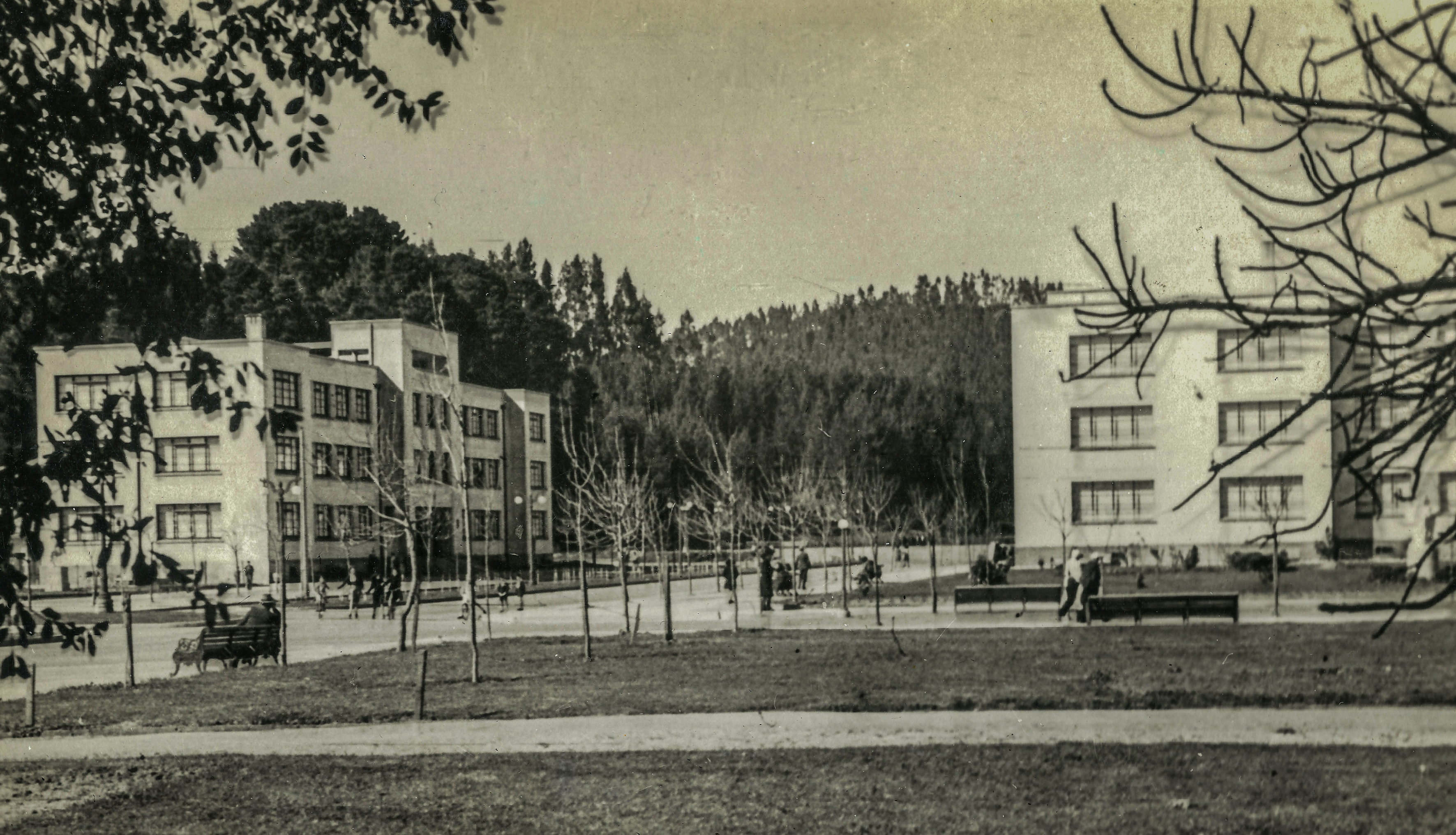 El Edificio de Biología (Ramón y Guillermo Infante, 1932) es el cuarto edificio que se construyó en el campus de la Universidad de Concepción. En su entrada, si uno mira hacia arriba con atención, está inscrito "Instituto de Biología General". Actualmente es la Facultad de Ciencias Naturales y Oceanográficas.